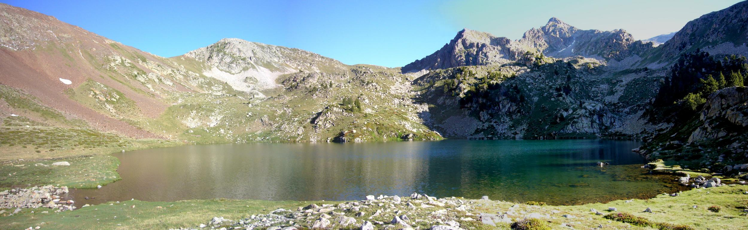 Estany Roi vist des de la riba sud-oriental; la Vall de Boí, Alta Ribagorça, Catalunya